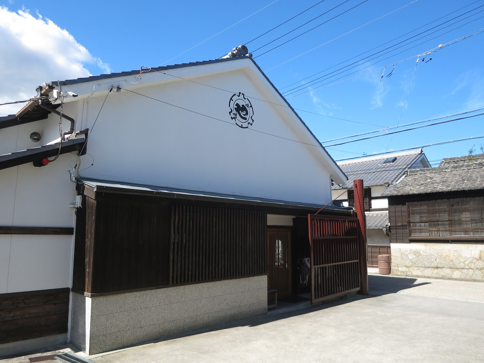 株式会社まるや八丁味噌（岡崎市八帖町）